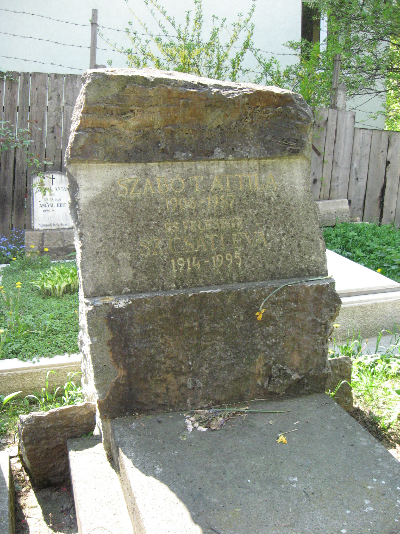 Házsongárdi temető: Szabó T. Attila sírja